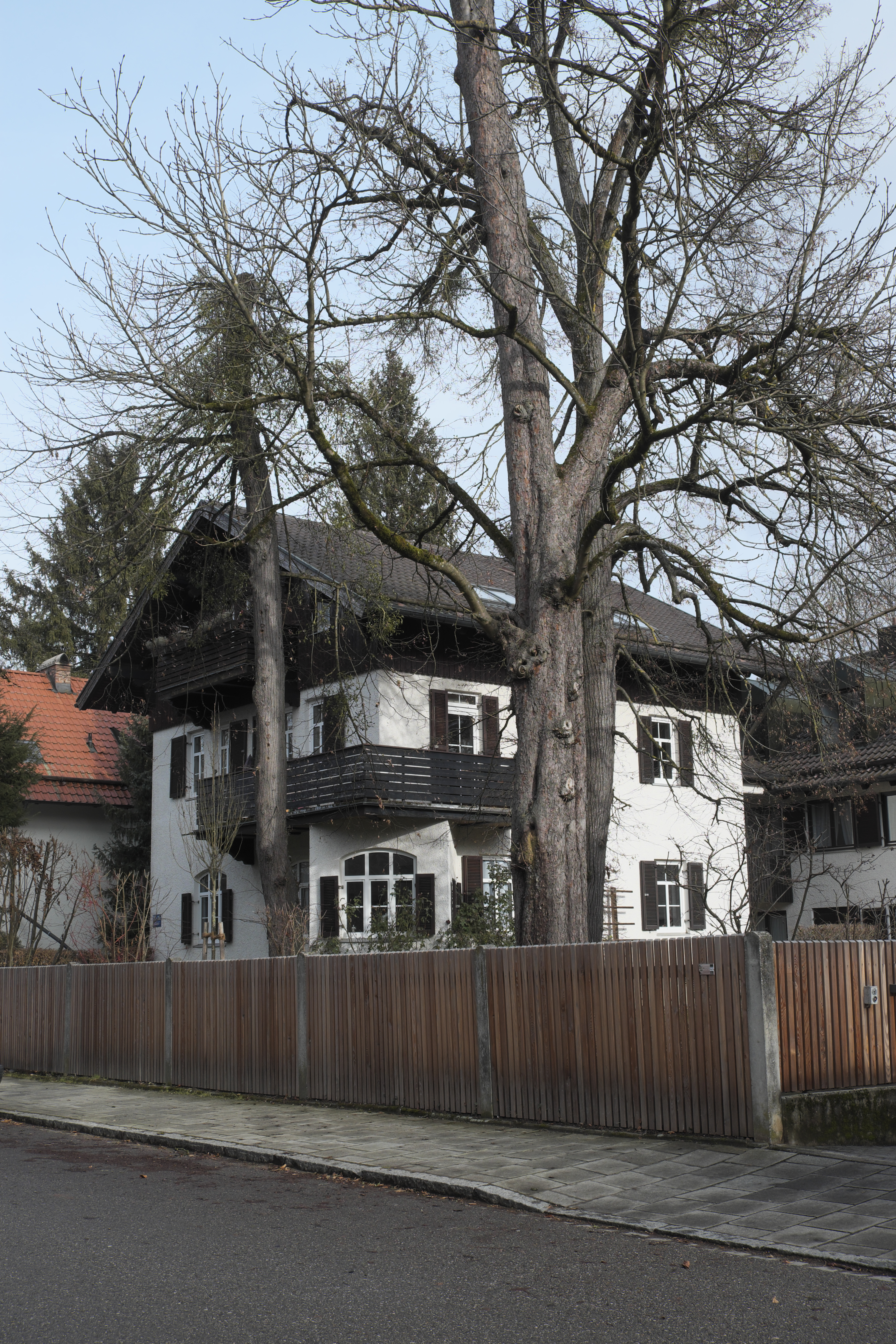 Villa in der Oselstraße 38 in Obermenzing im Stadtbezirk Pasing-Obermenzing in München (Bayern/Deutschland)